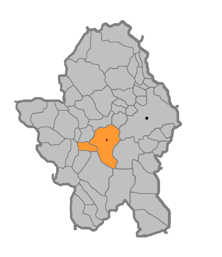 Мјесна заједница Кола